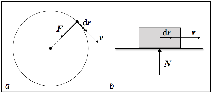 Indarra ibilbidearen perpendikularra denean, egiten duen lana nulua da.